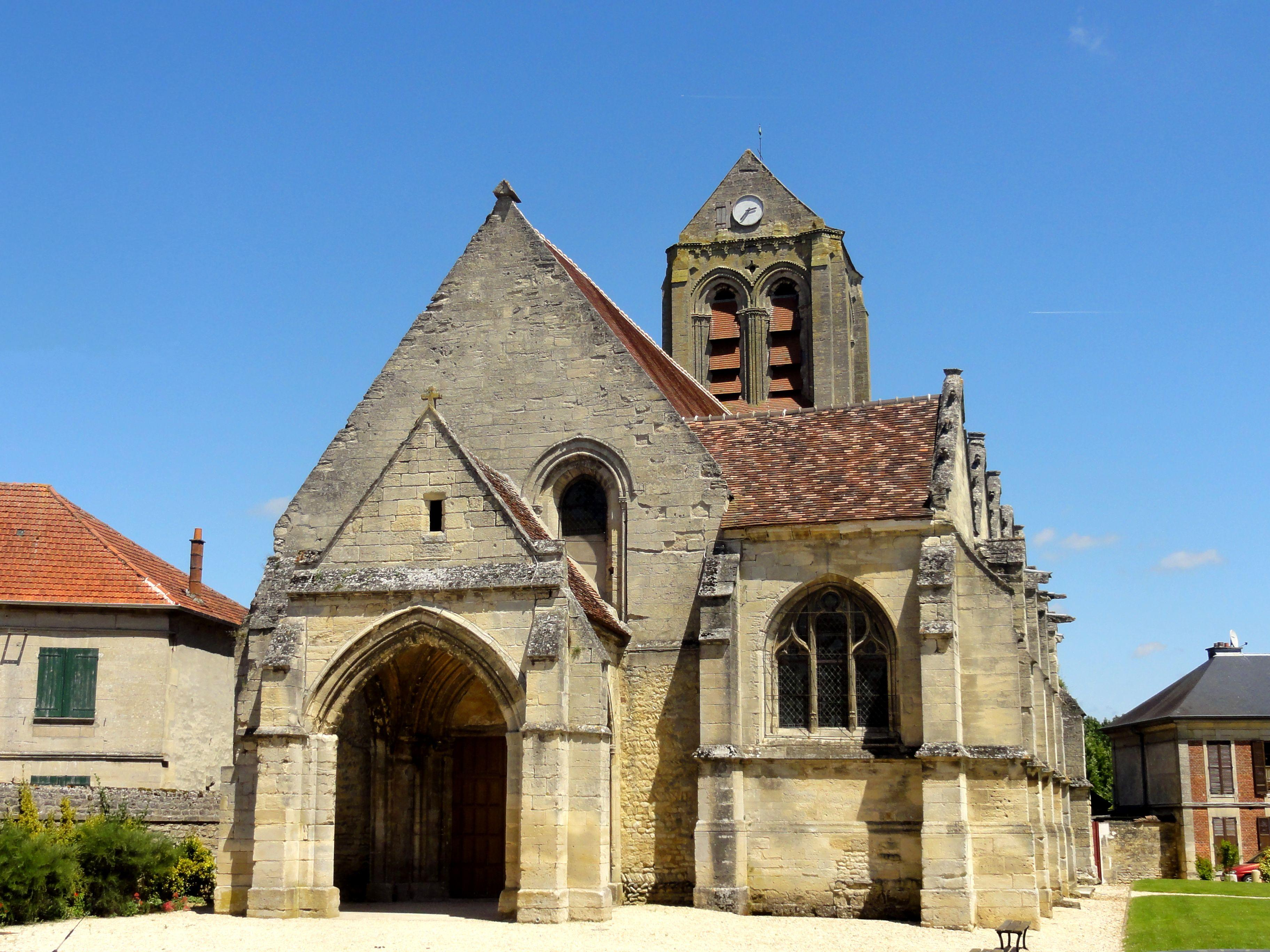 Façade occidentale.